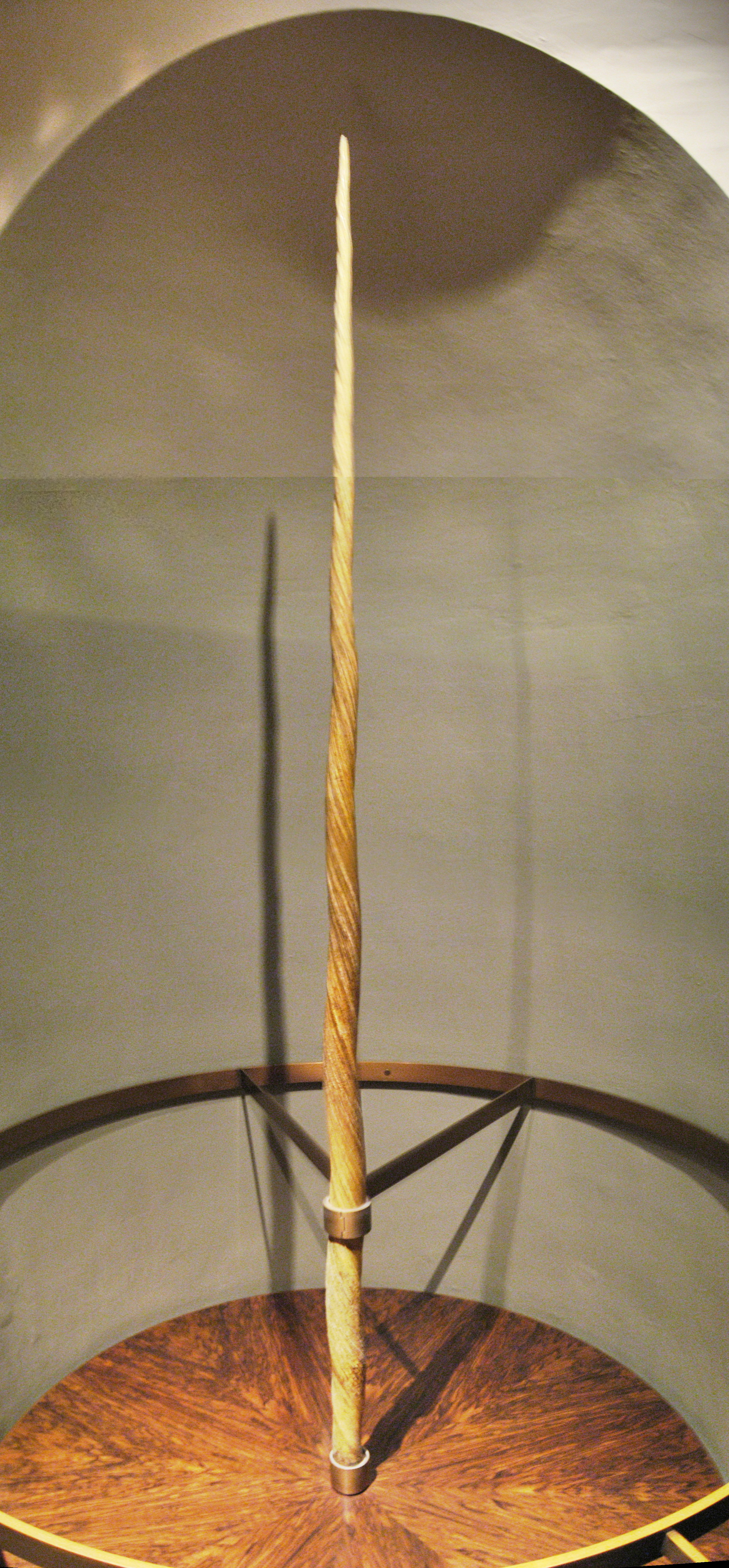 Das "Ainkhürn" (Einhorn). 1. Hälfte des 16. Jahrhunderts. Narwalzahn. Inv. Nr. XIV 2.